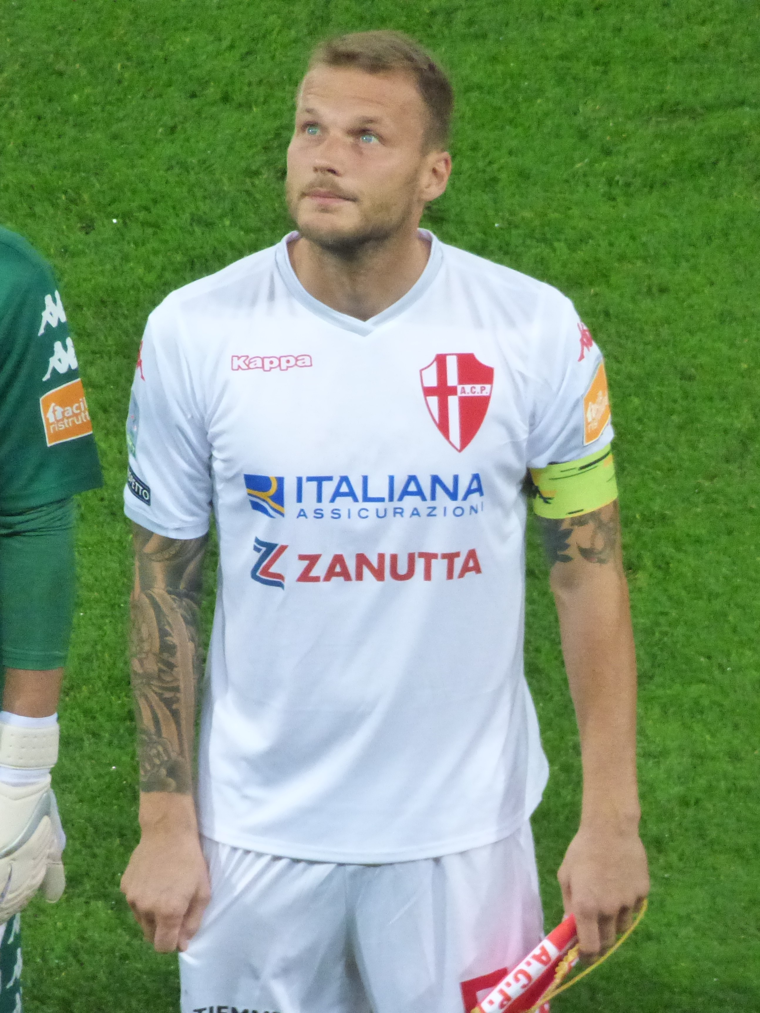 Trevor Trevisan lors du match amical RC Lens - Calcio Padova, le 11 octobre 2018 au Stade Bollaert-Delelis de Lens.